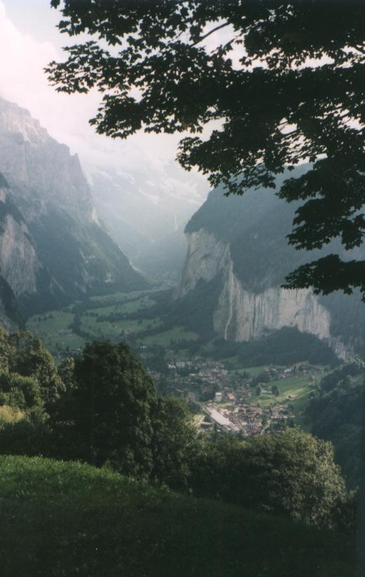 Description